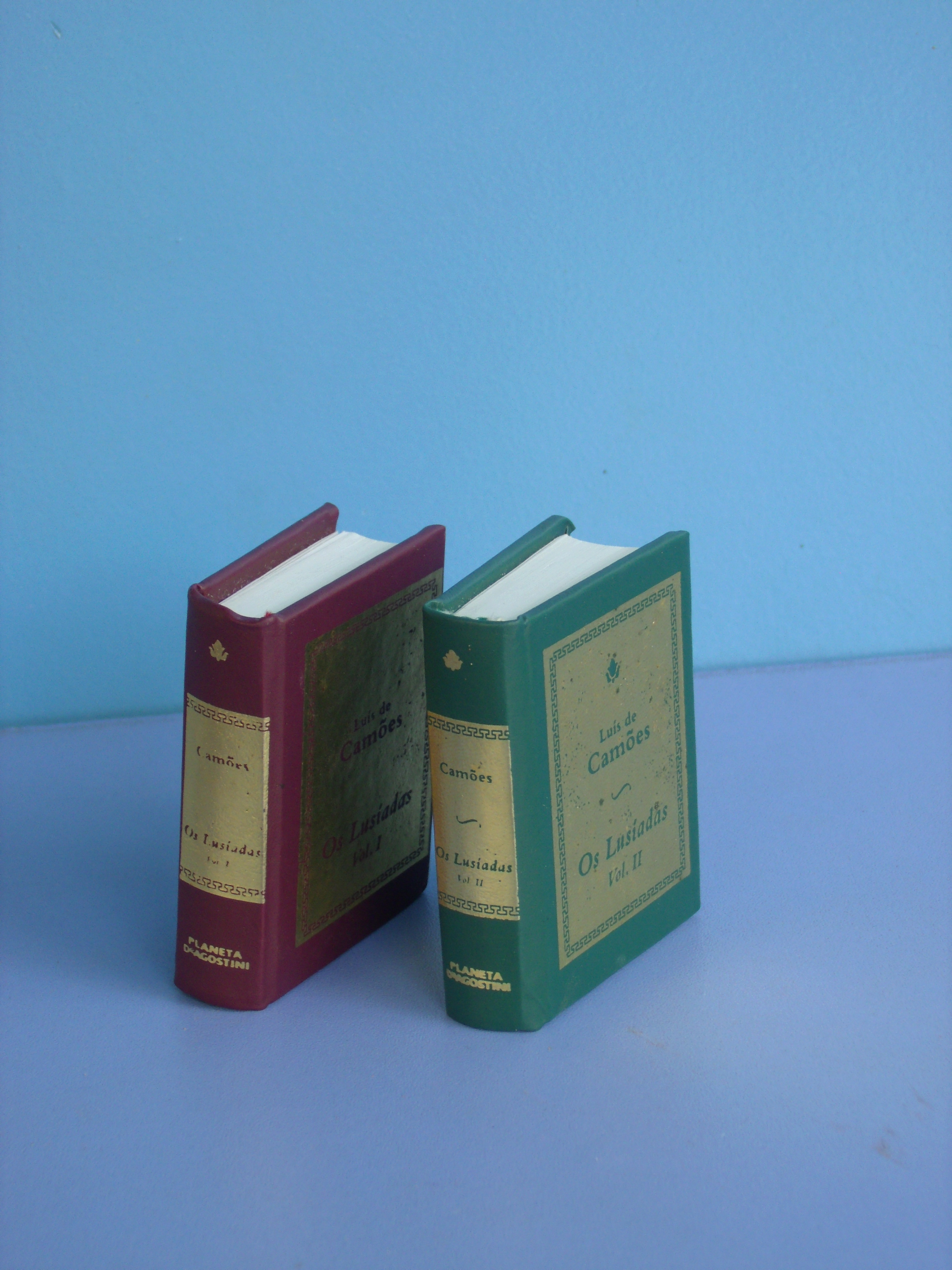 Os Lusíadas, em miniatura, editados em 2003, no Brasil pela editora Planeta DeAgostini.